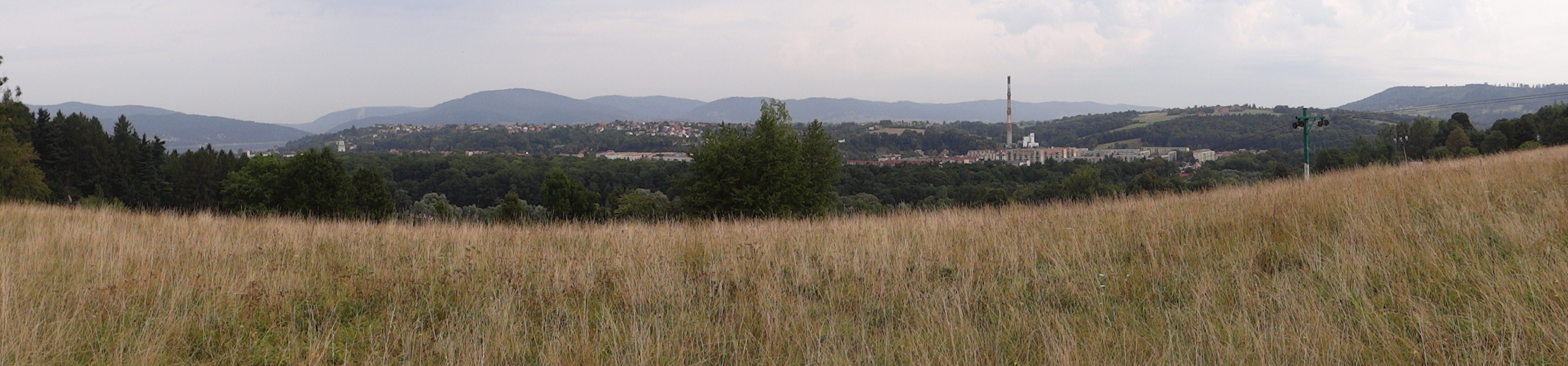 Panorama widokowa z Grojca koło Zywca